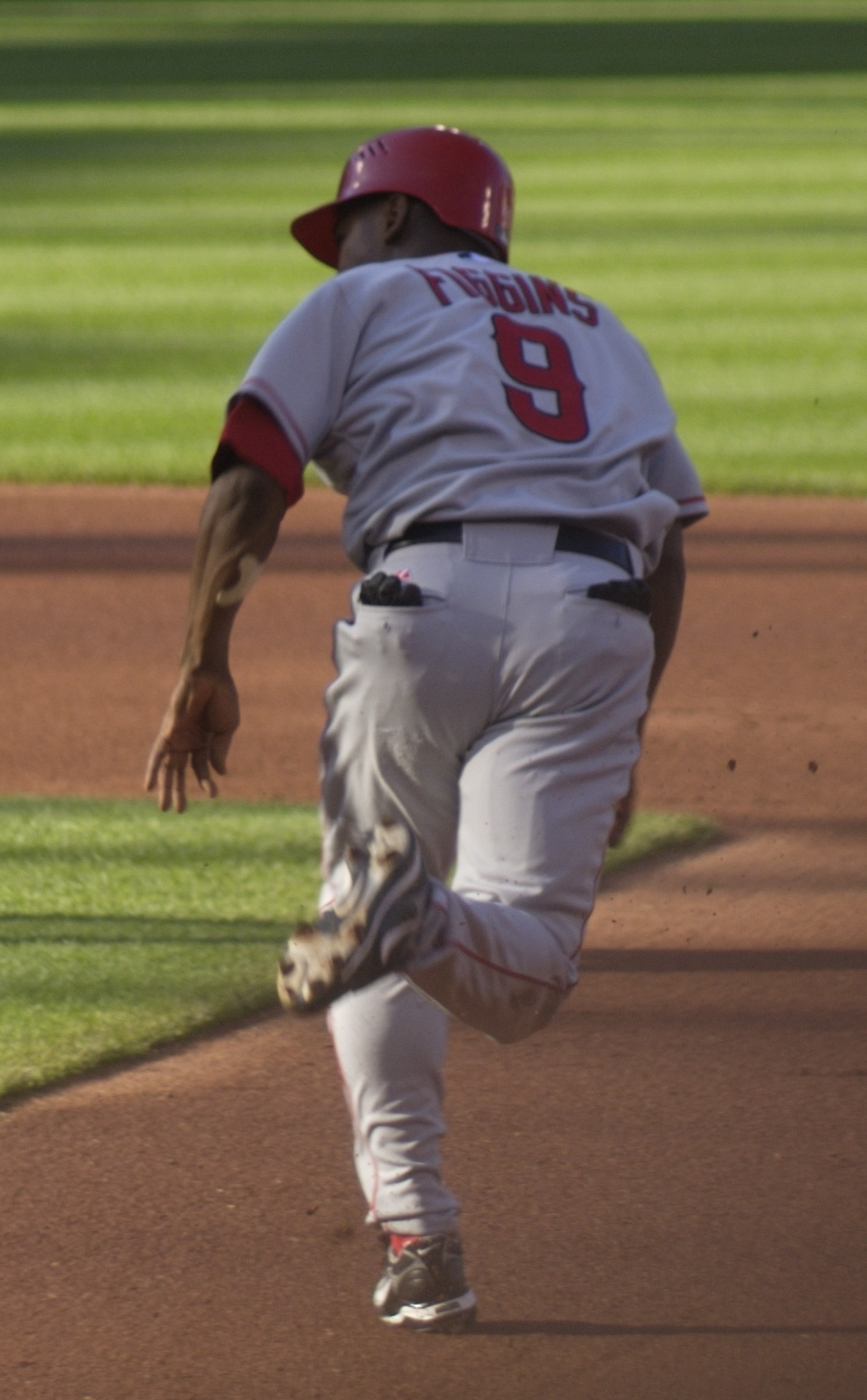 Chone Figgins